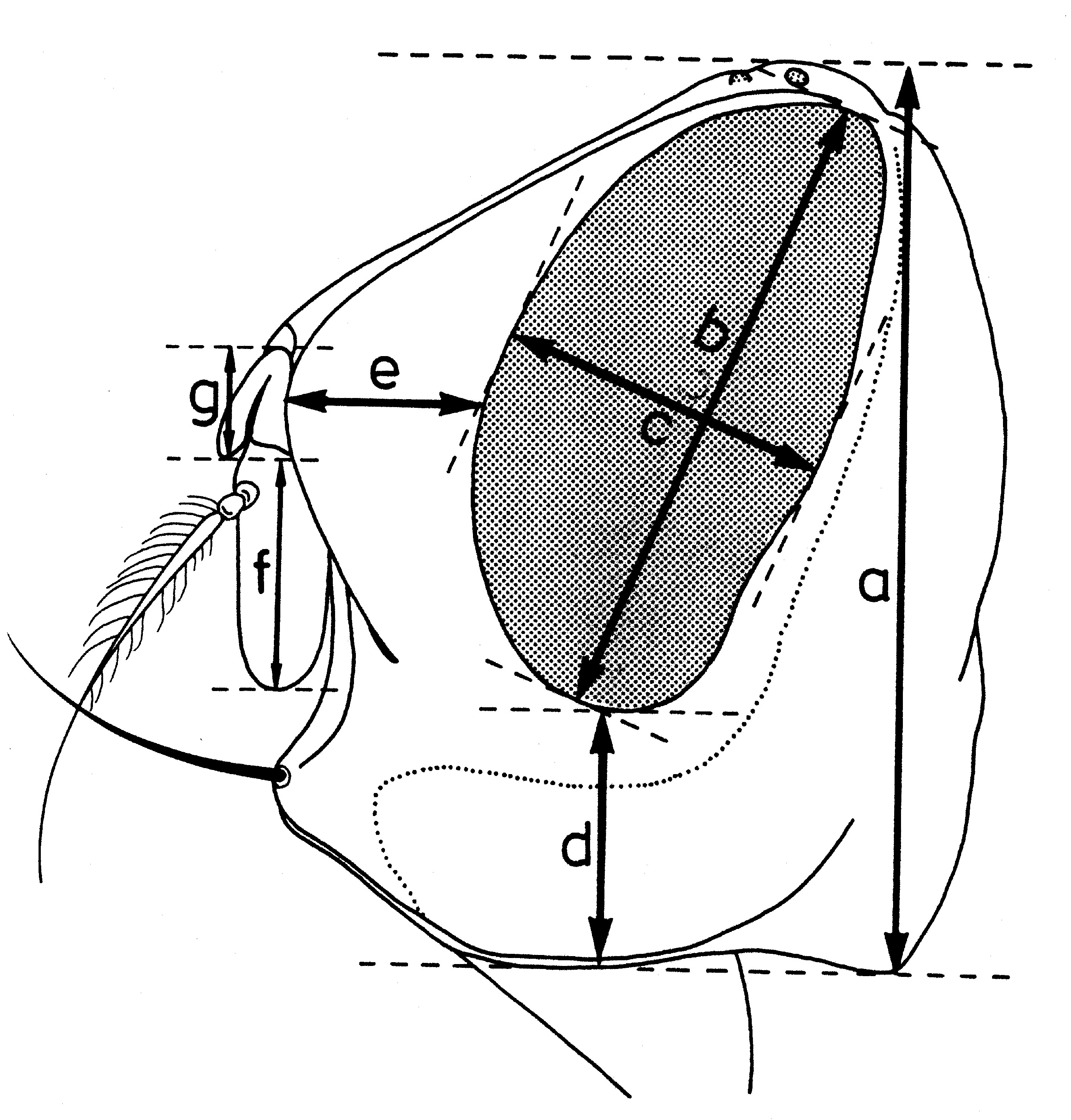 Fig. Parametres dimensionnels de la tete, vu de profil